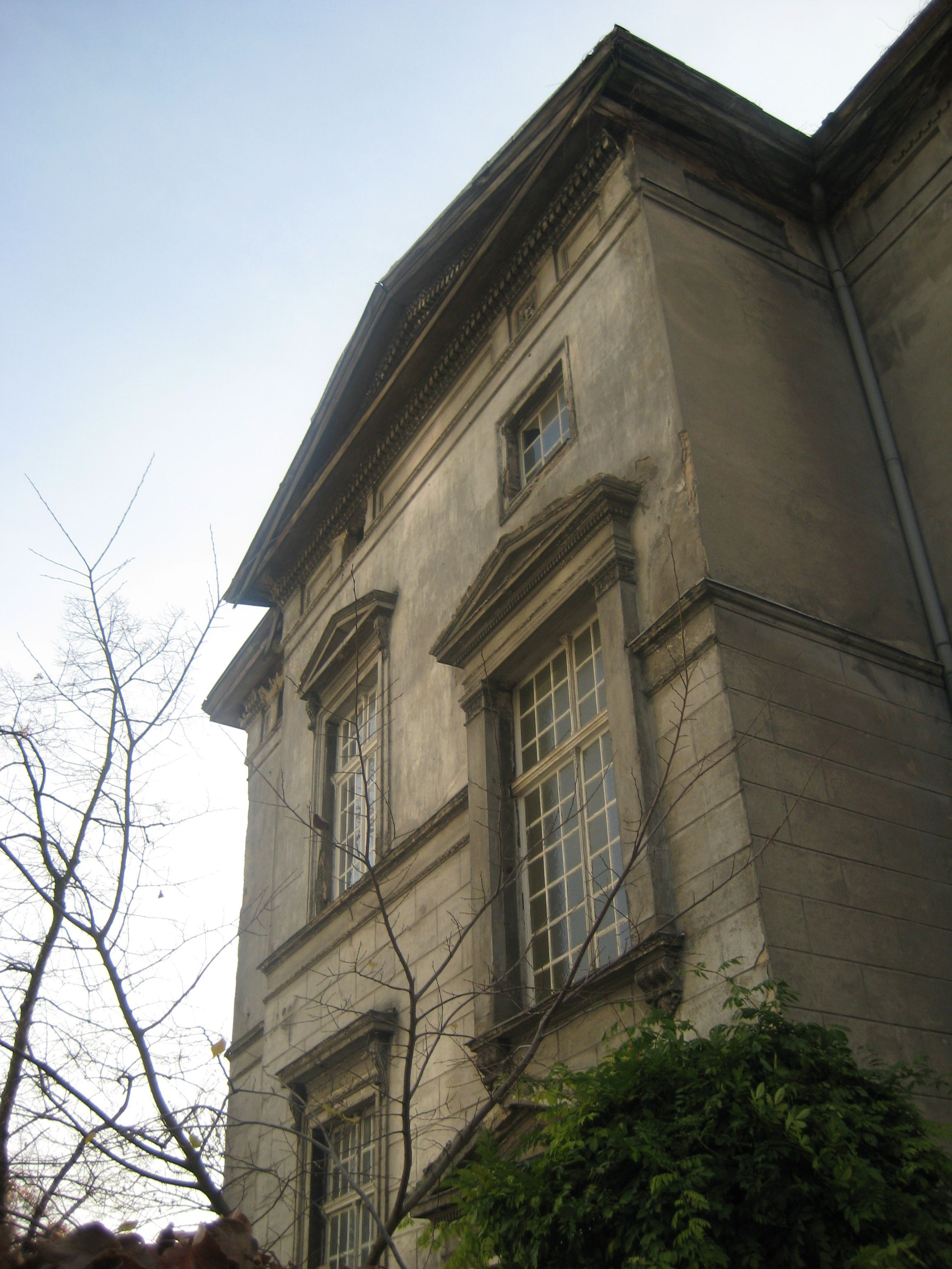 das denkmalgeschützte Haus Lindenberg, Methfesselstraße 23-25 in Berlin-Kreuzberg, nördliche Hausfassade; errichtet von Architekt E. Becher 1874 /the landmarked Haus Lindenberg, Methfesselstraße 23-25 in Kreuzberg, Berlin, northern front; built in 1874 by architect E. Becher.